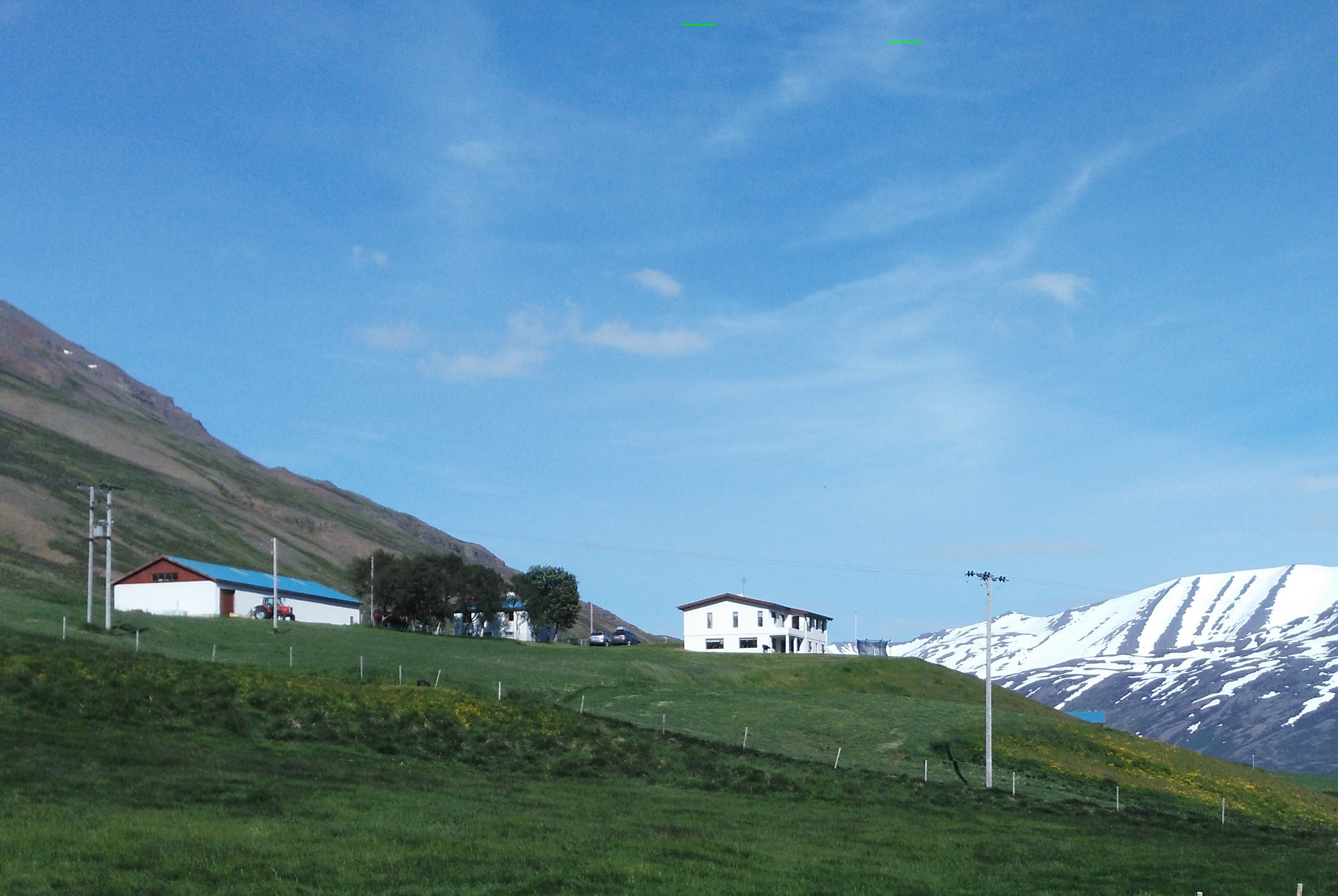 Hóll í Svarfaðardal